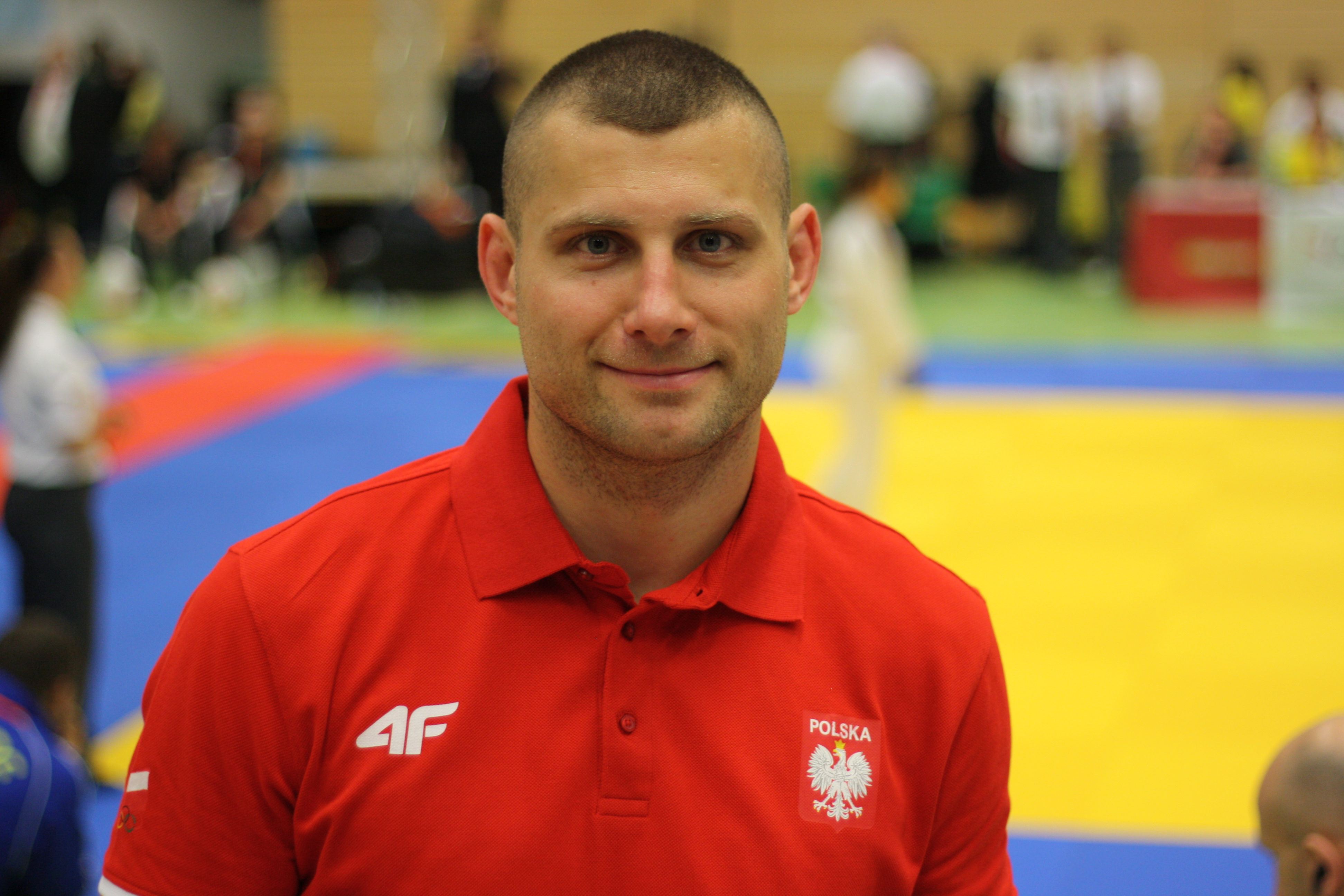 Tomasz Szewczak podczas Mistrzostw Europy w Ju-jitsu - Walldorf 2013r.